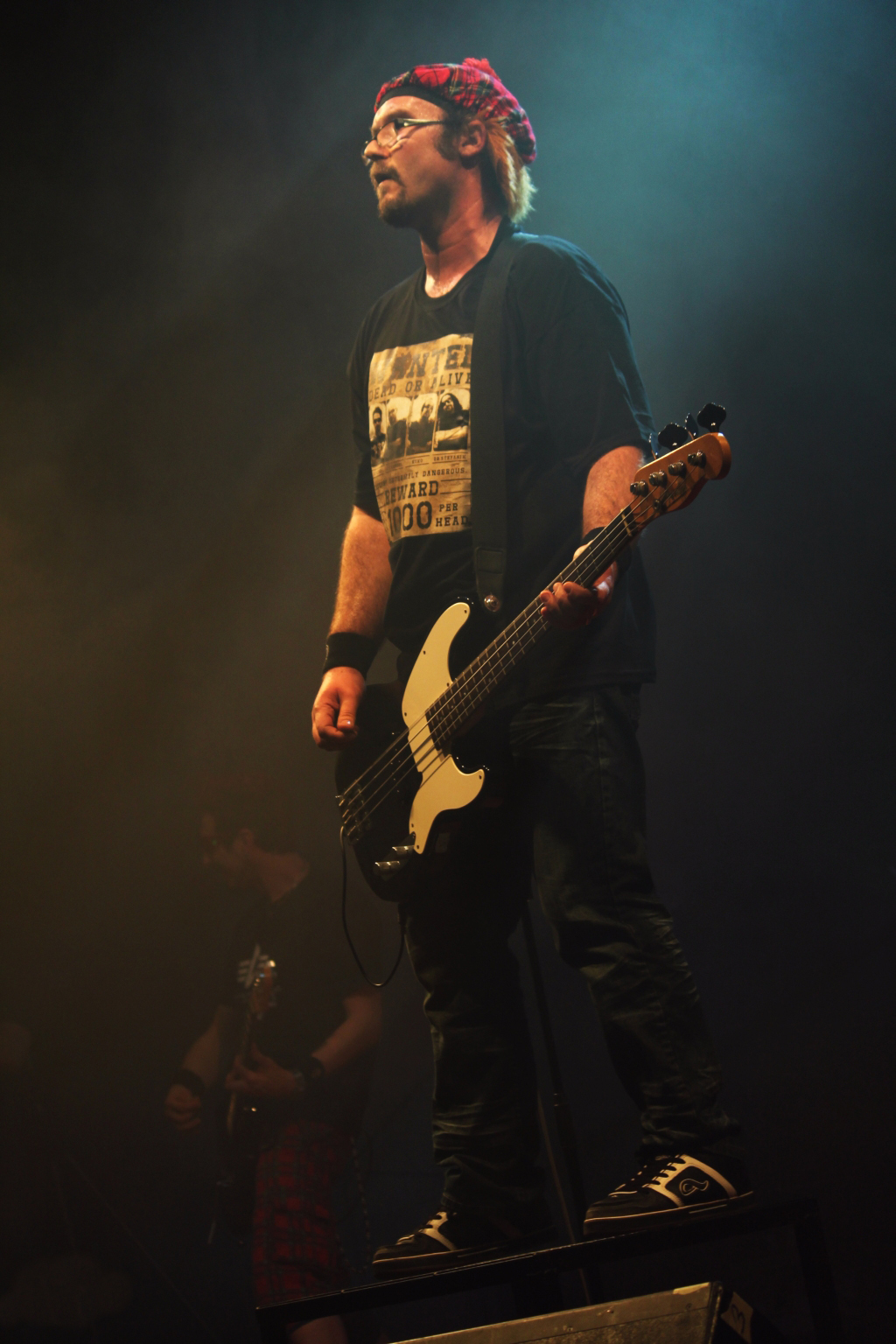 Peter "Kuko" Hrivňák, PKO, 4.3. Bratislava